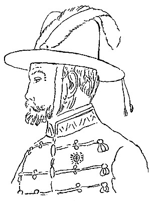 Petőfi Sándor ceruzarajza Bem Józsefről